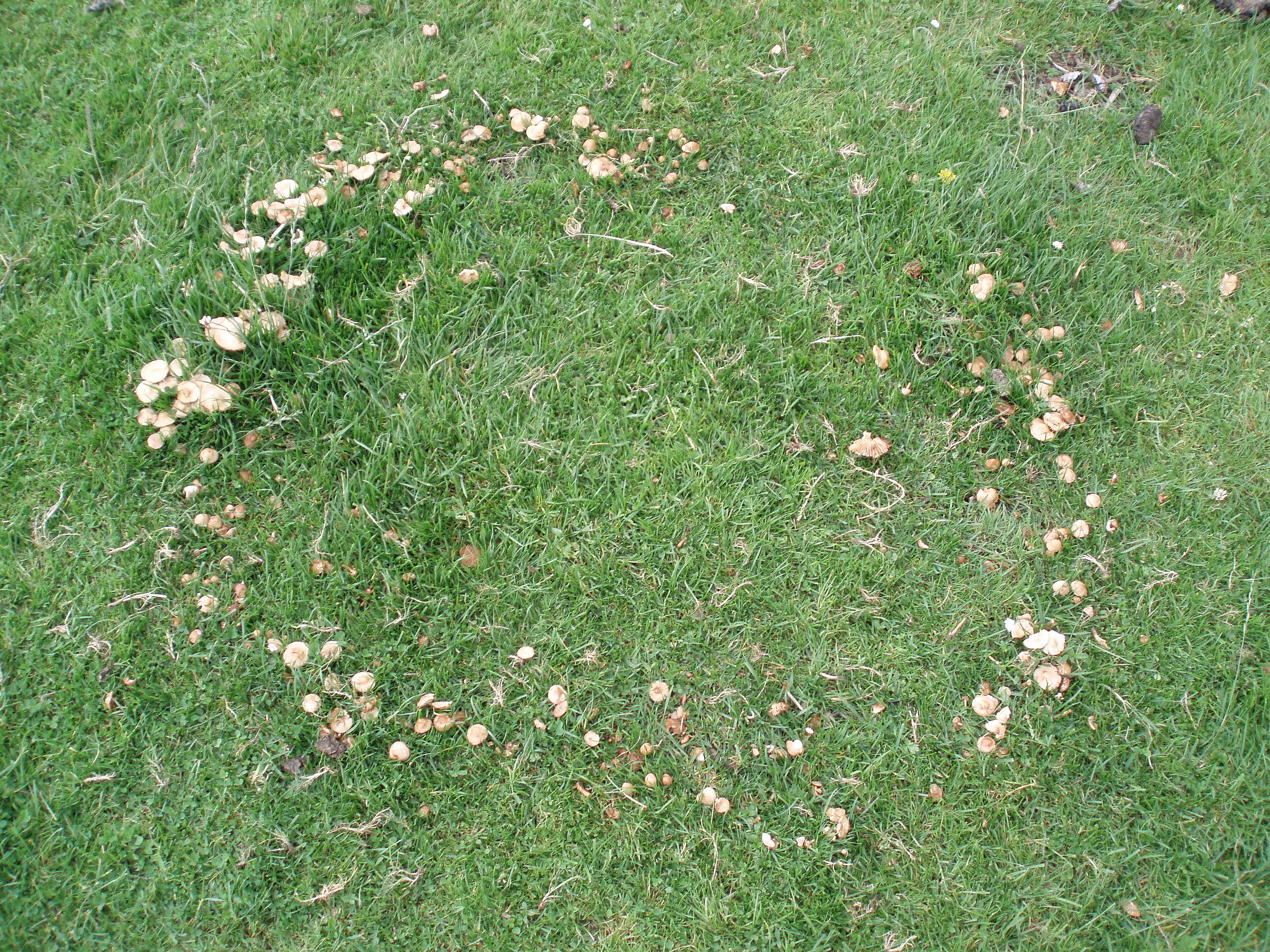 Een heksenkring in een weiland te Willeskop.